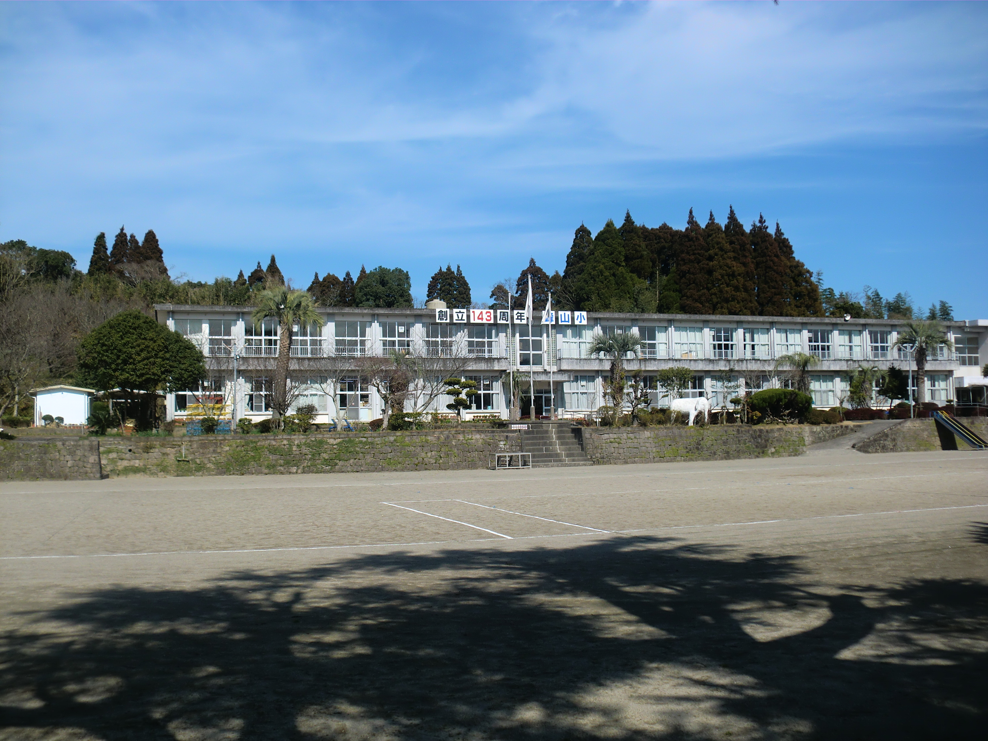 薩摩川内市にある薩摩川内市立峰山（みねやま）小学校